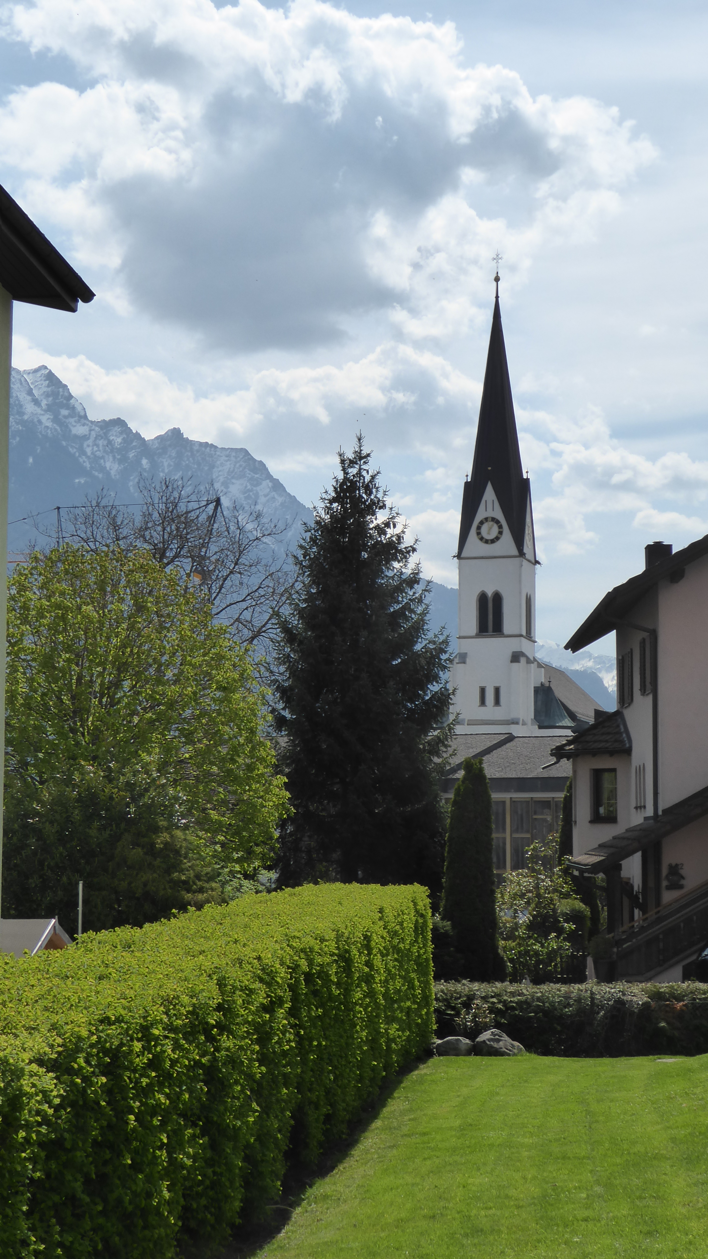 Dorf Eschen FL, Blick auf die Kirche